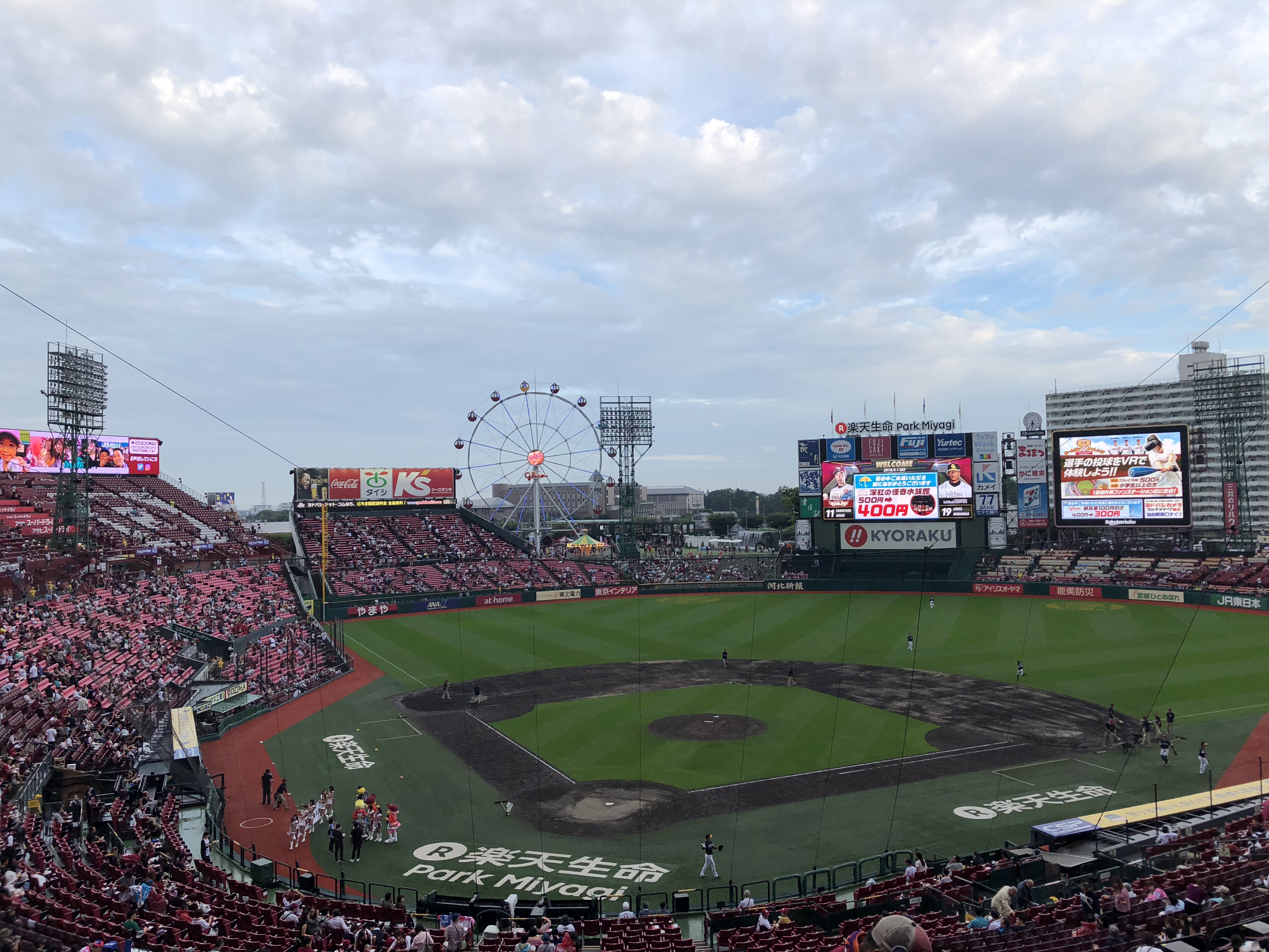 楽天生命パーク宮城。バックネット裏から撮影。